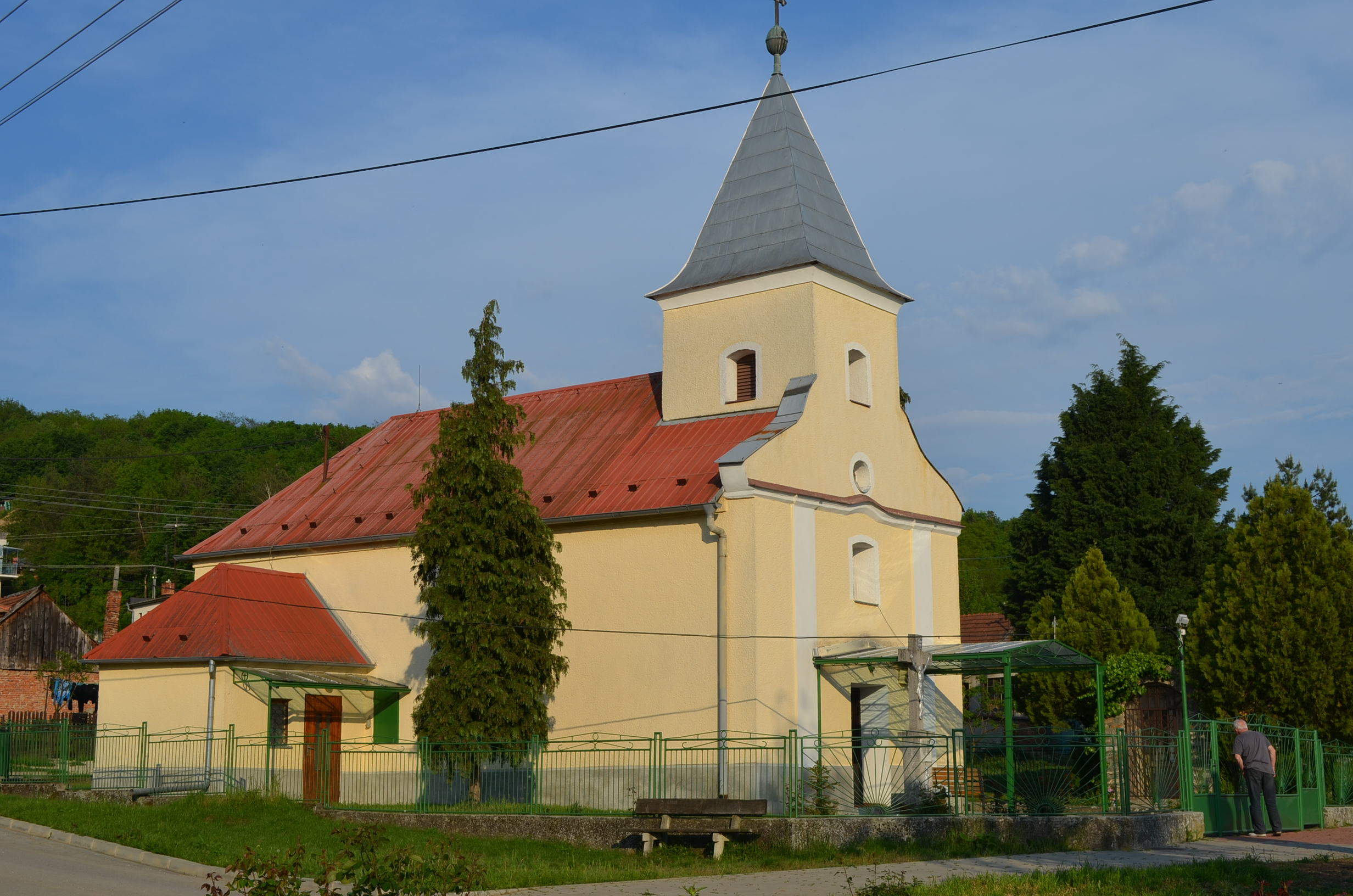 Béd falu